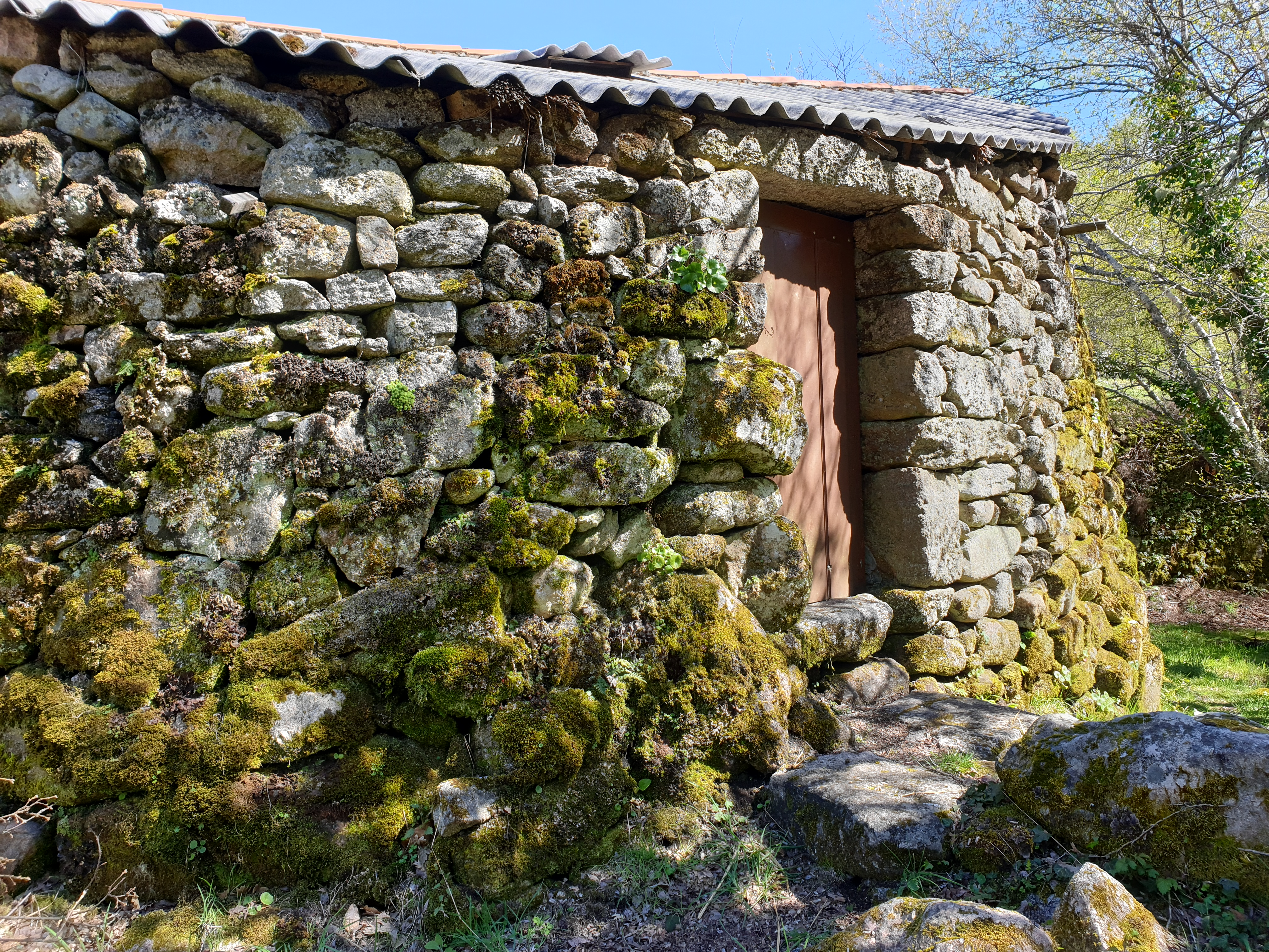 Forno de Salgueiro